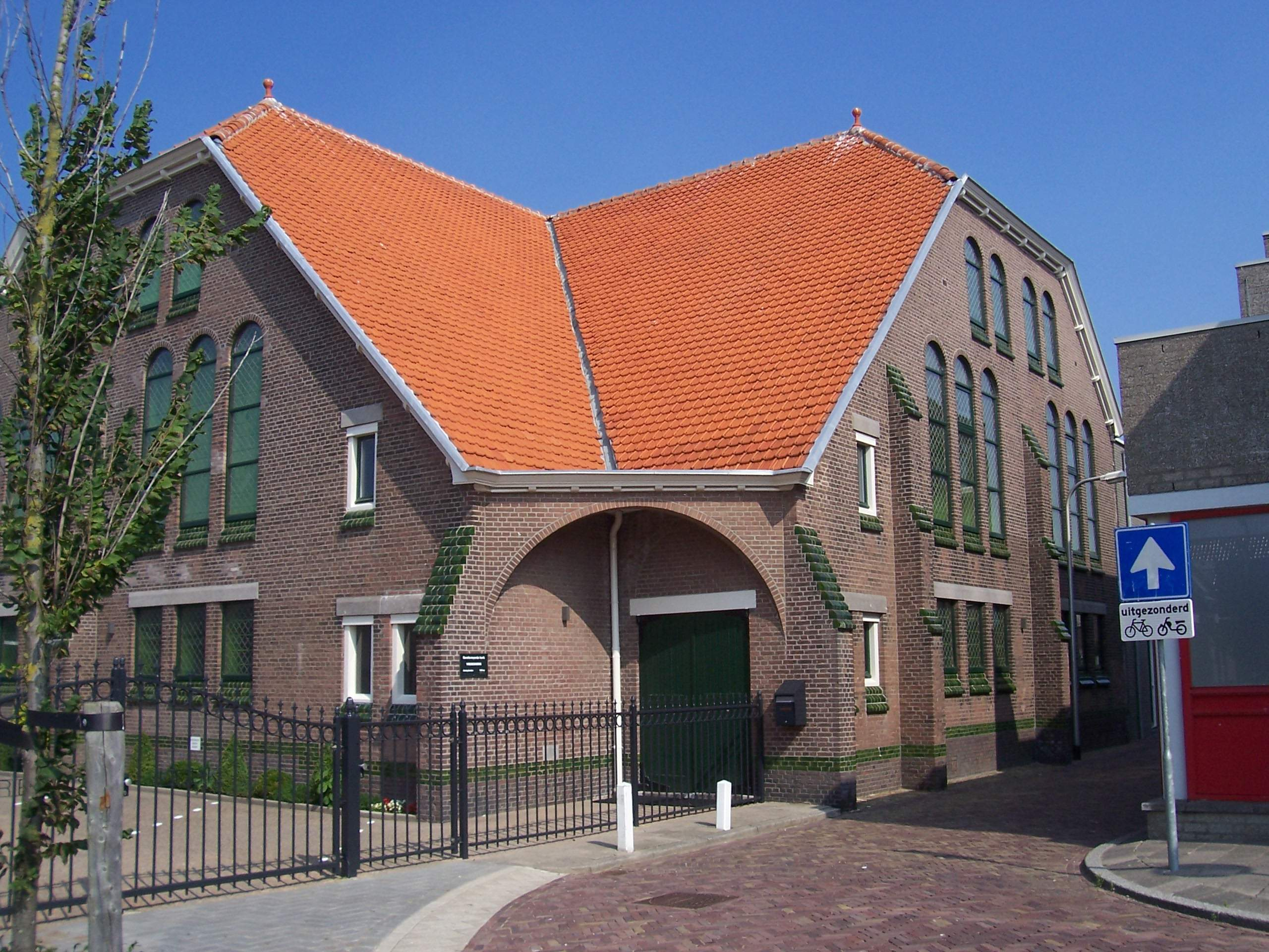 Vredeskerk Katwijk, Baljuwstraat.